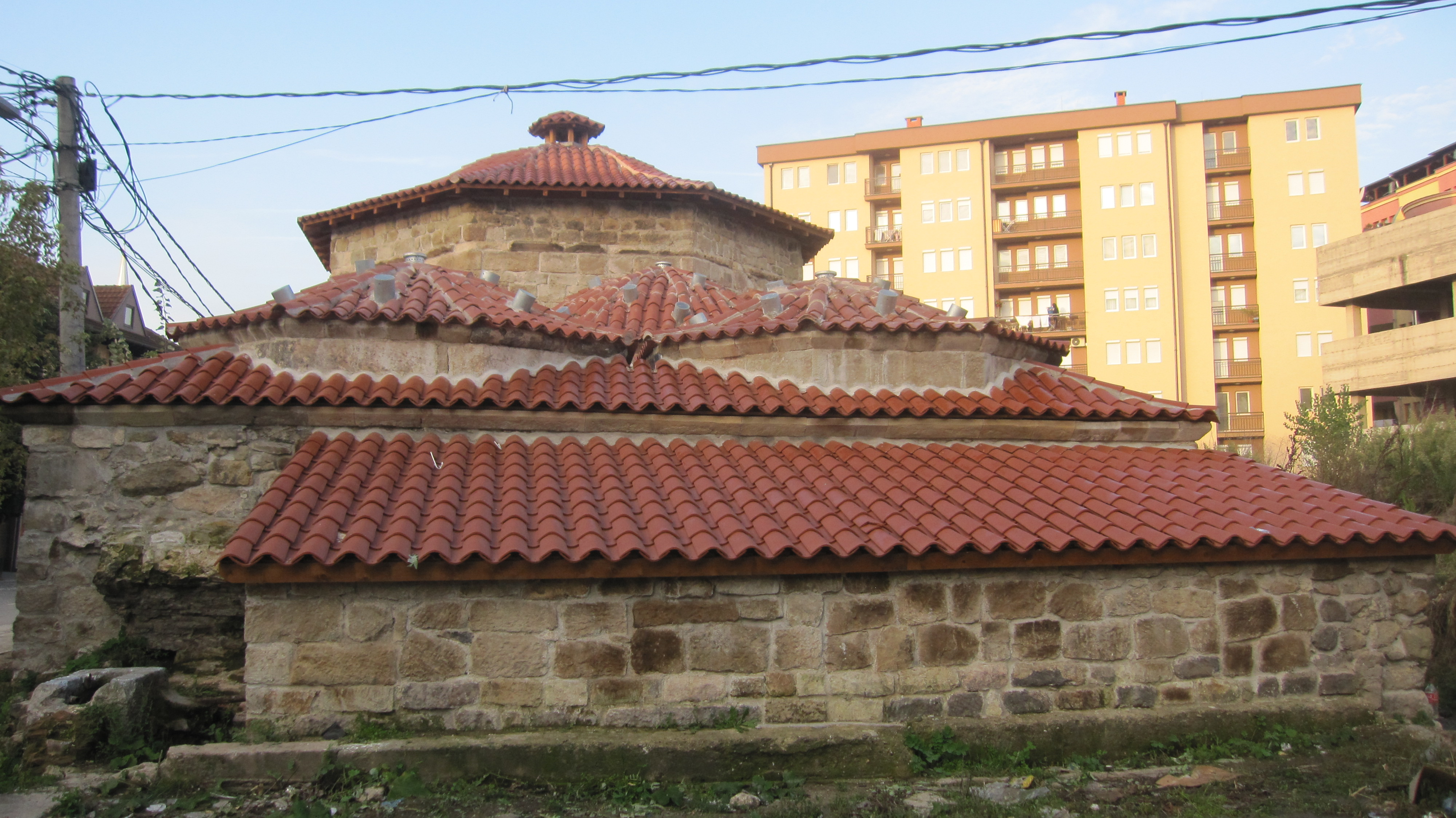 Hamami i Vjetër